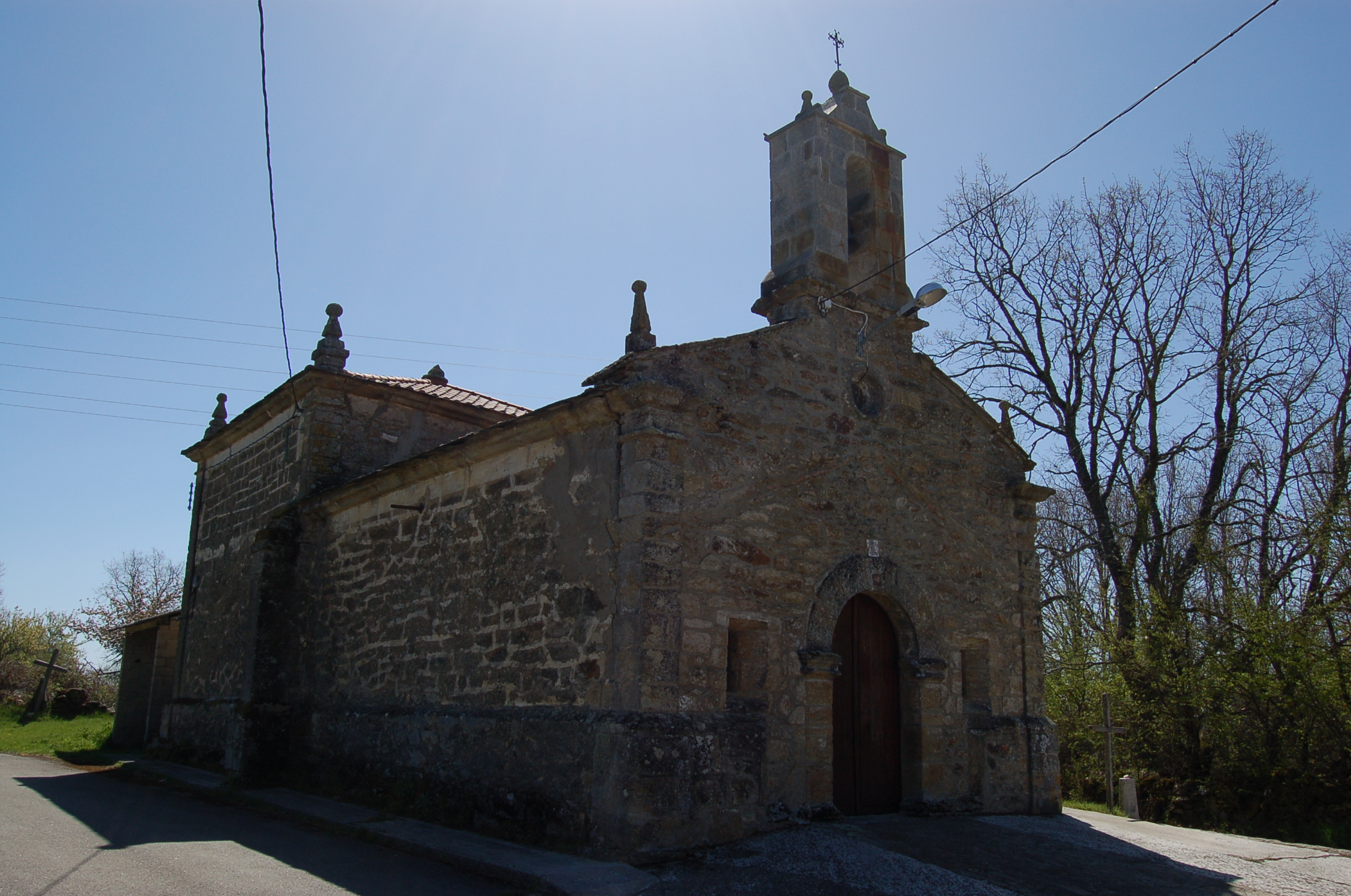 Ermida del Cristo en Cernadilla